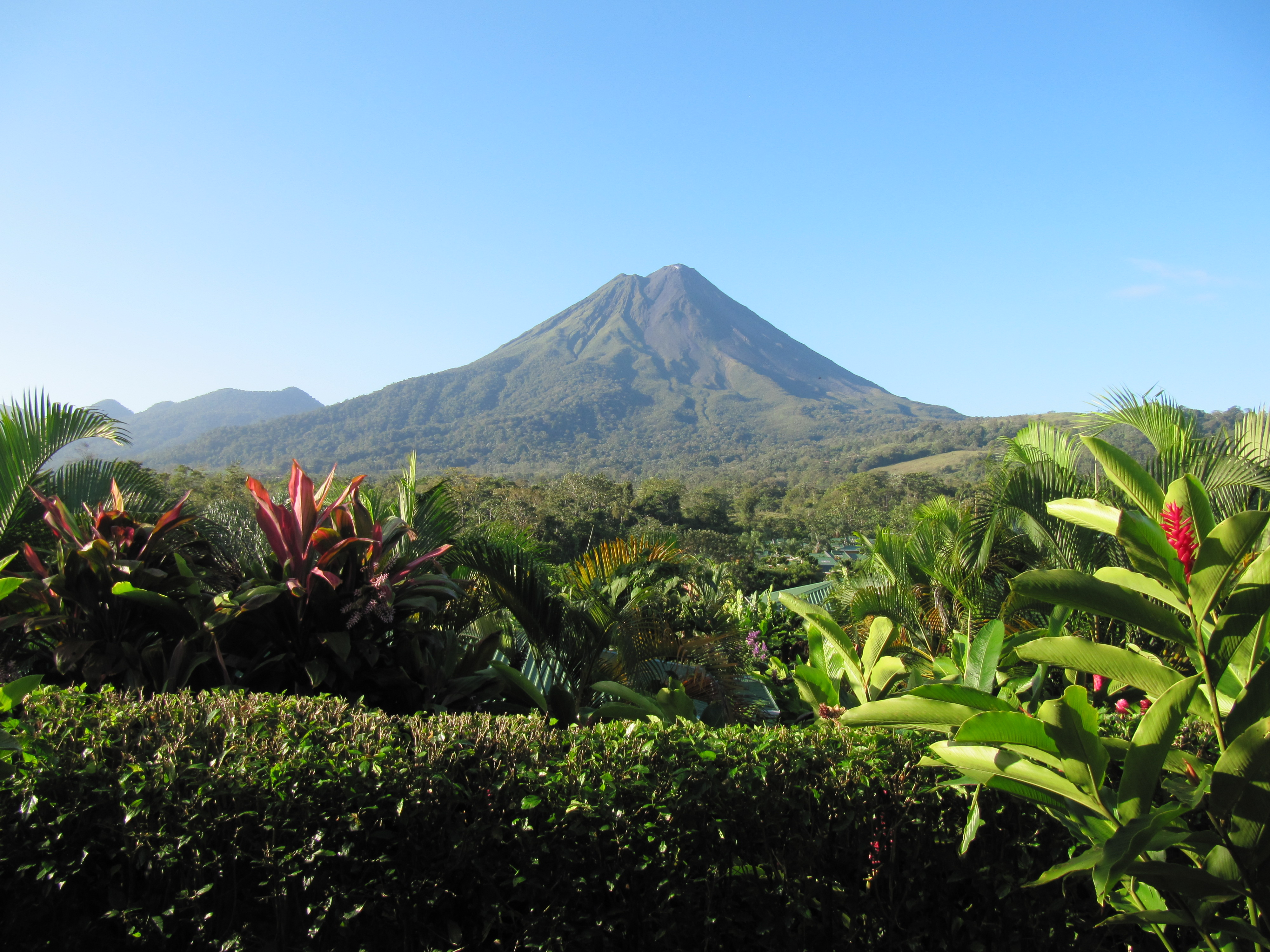 Volcán Arenal. Costa Rica.